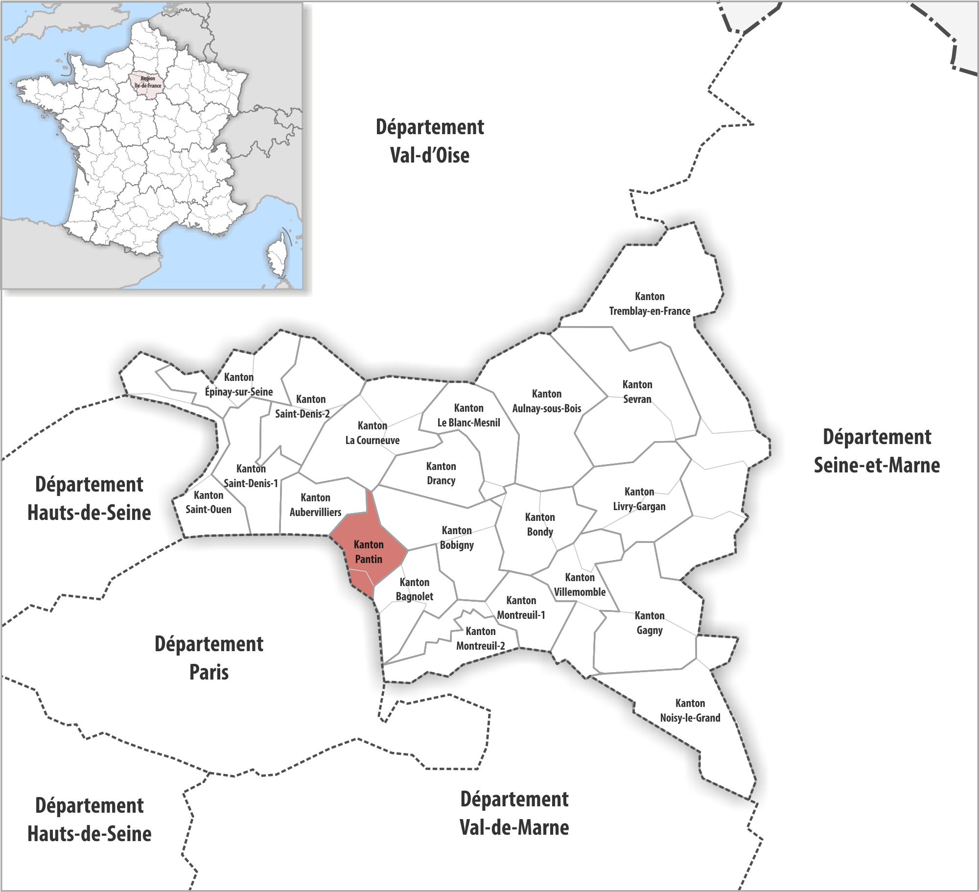 Lage des Kantons Pantin